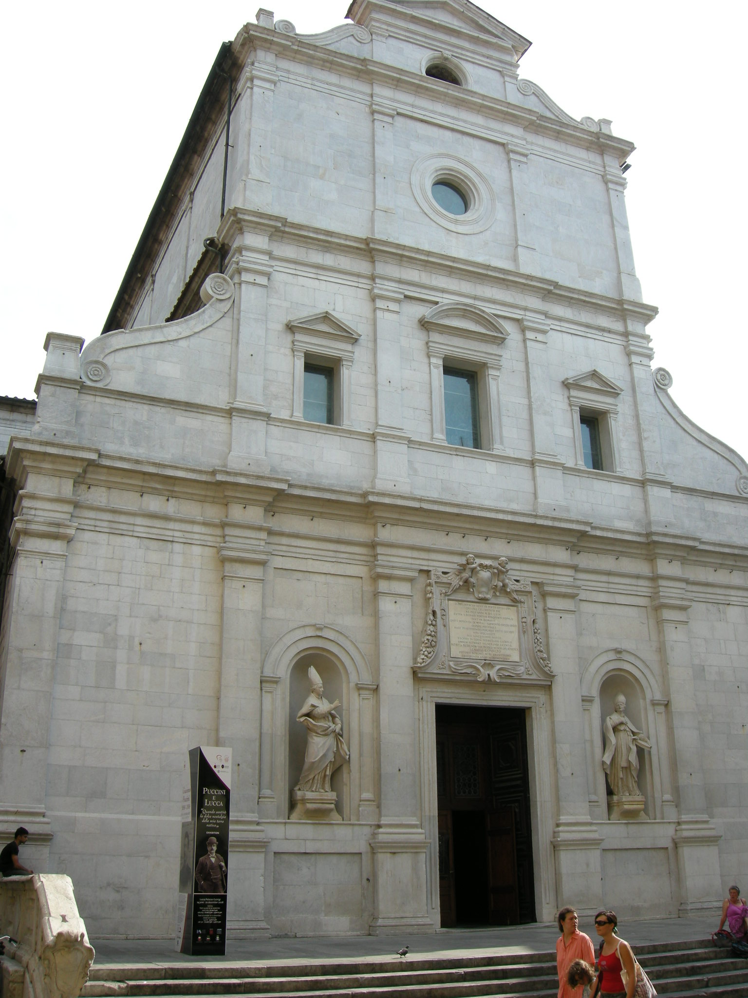 Chiesa dei Santi Paolino e Donato